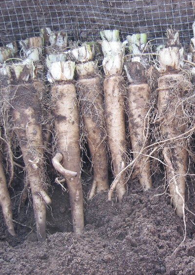 Ouderwets opzetten van witlofpennen in een kuil.